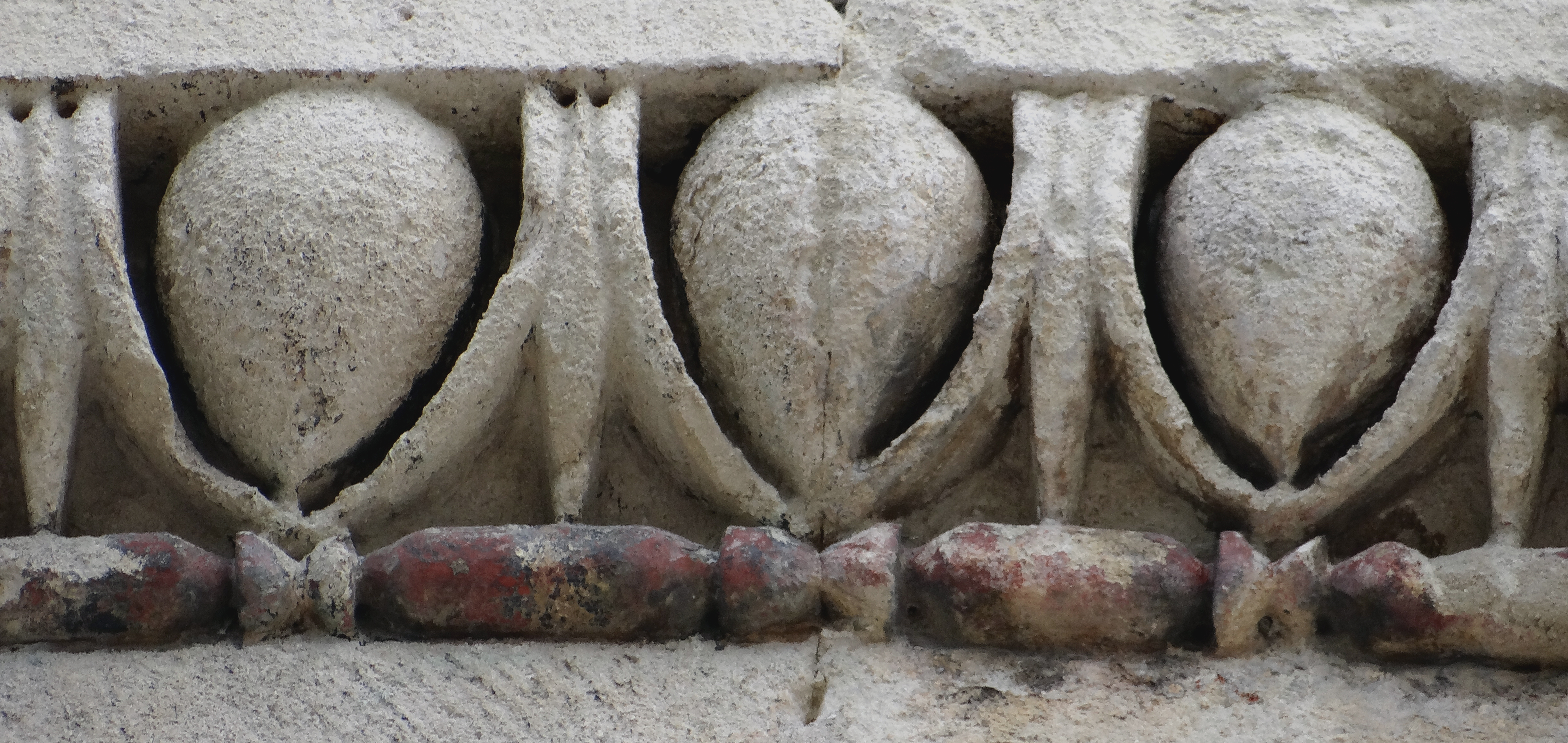 Kimation i astragal. Francja Lyon.